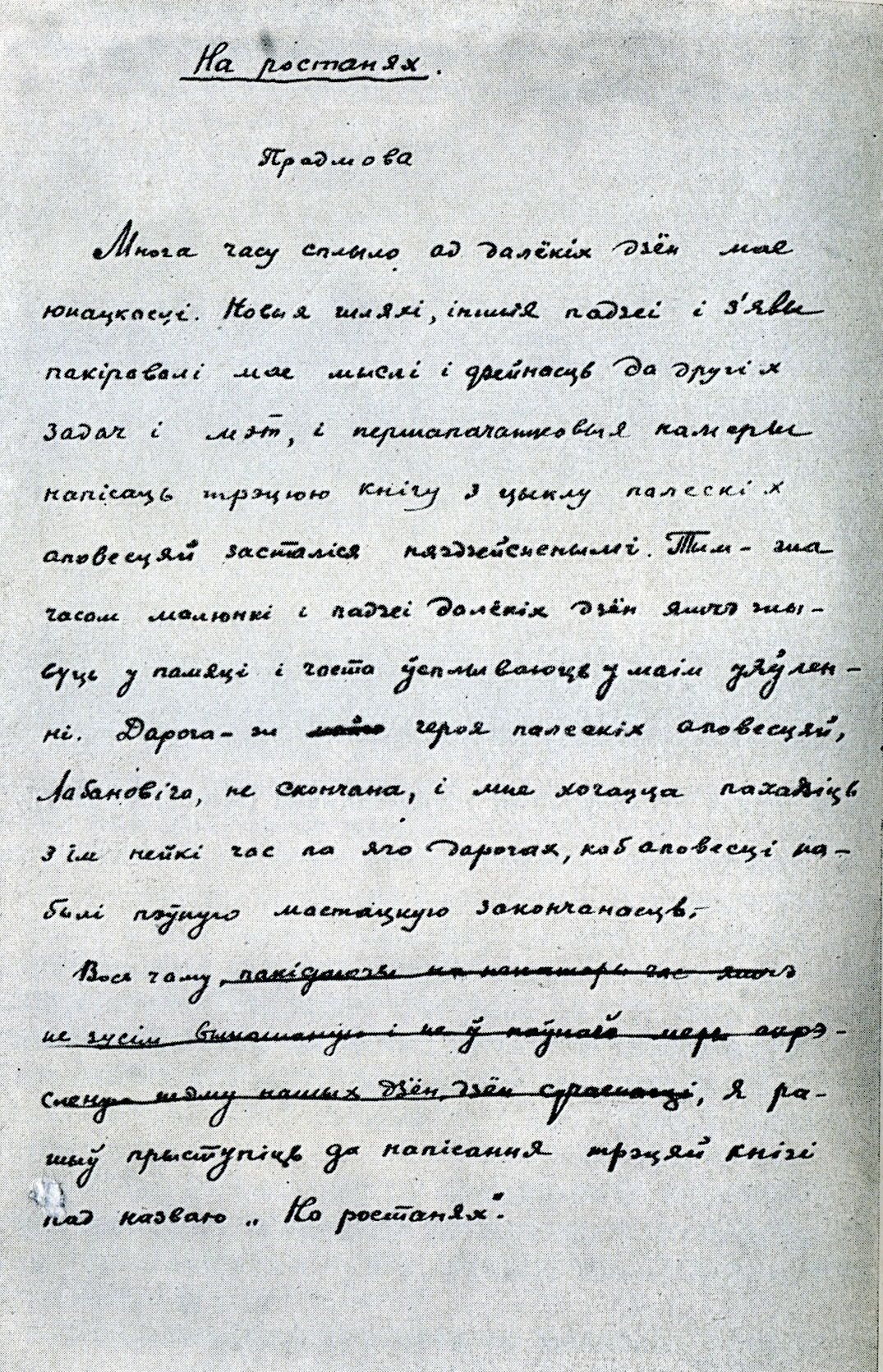 Аўтограф прадмовы да трэцяй кнігі трылогіі "На ростанях" Беларуская (тарашкевіца): Аўтограф прадмовы да трэцяй кнігі трылёгіі На ростанях